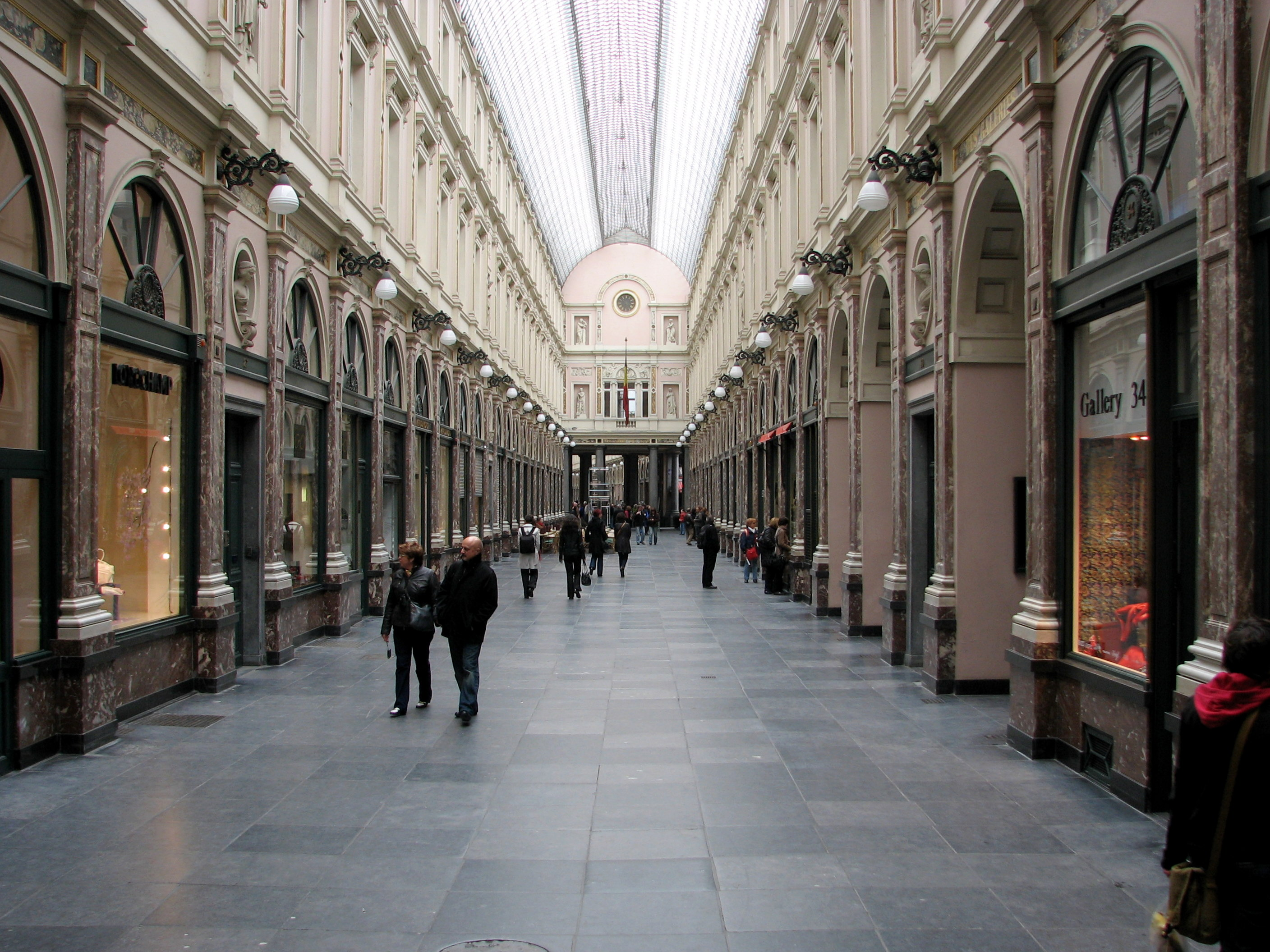 Brussels Royal Galleries of Saint-Hubert - Koninklijke Sint-Hubertusgalerijen